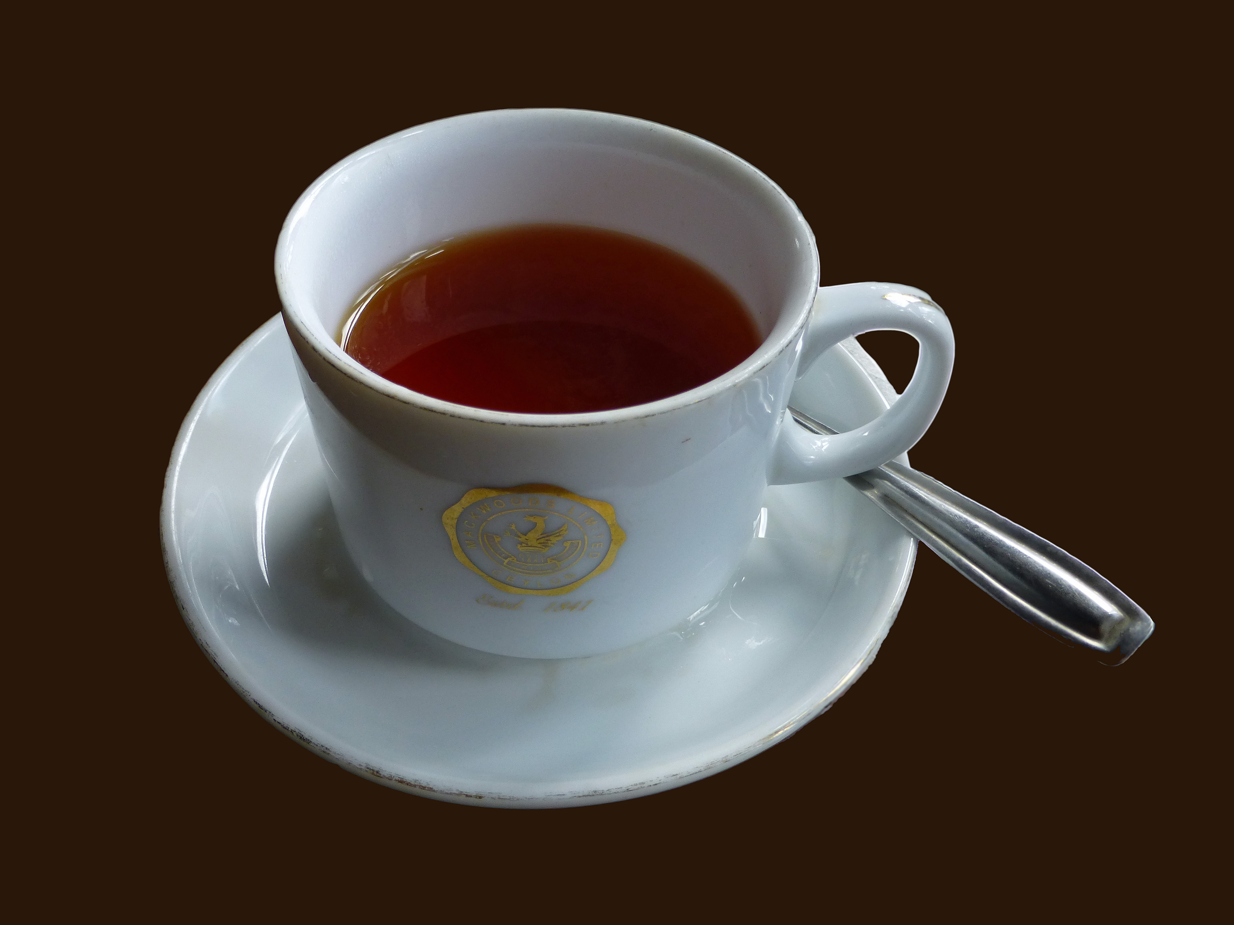 Une tasse de thé (Broken Orange Pekoe) de Mackwoods Labookellie (Sri Lanka)